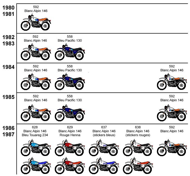 Couleur des R80G/S en fonction du millésime